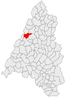 Categorie:Hărţi ale judeţului Bihor